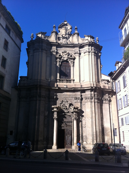 facciata di San Pietro Celestino, Milano